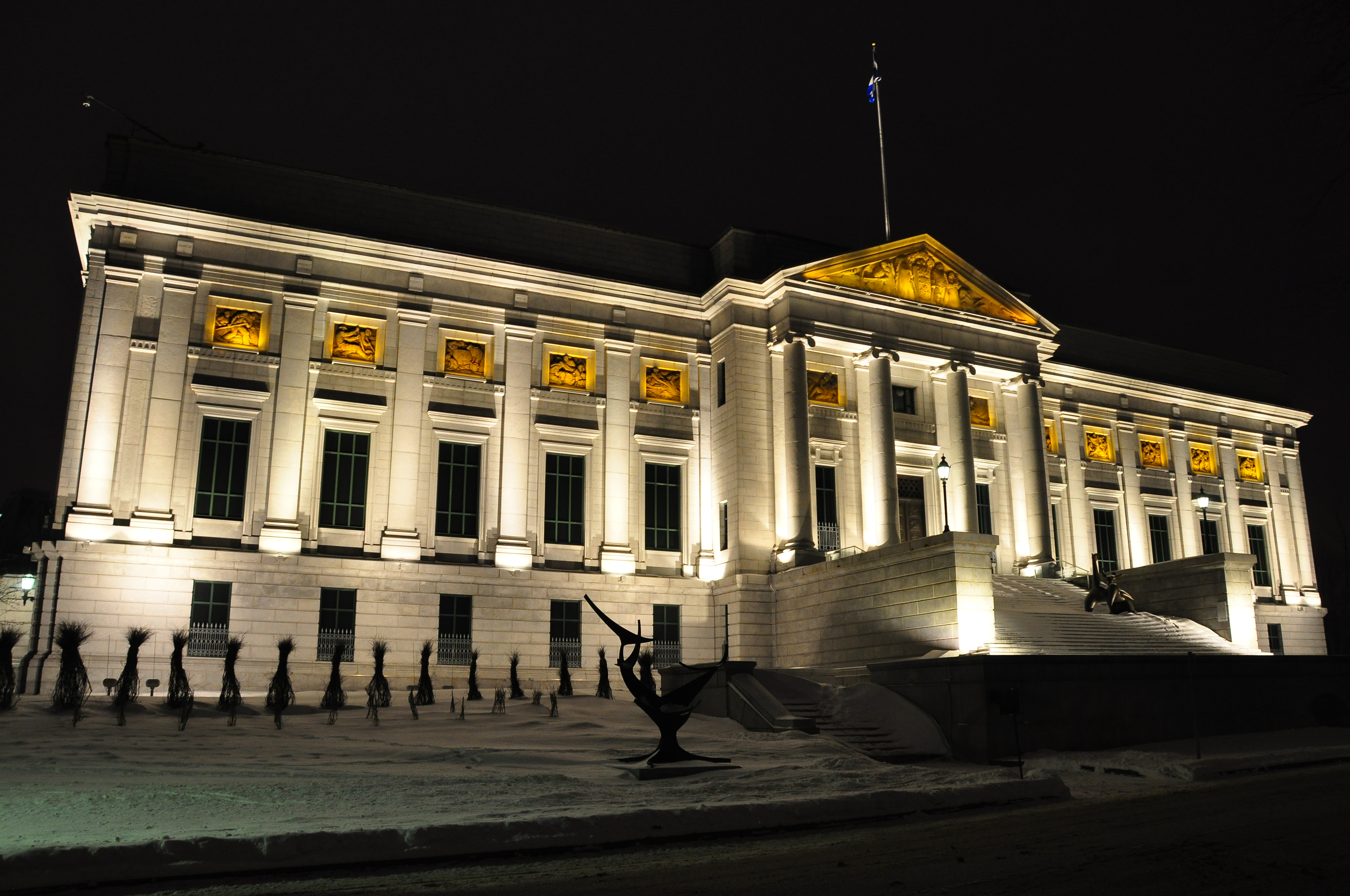 Plaines d'Abraham, ville de Québec